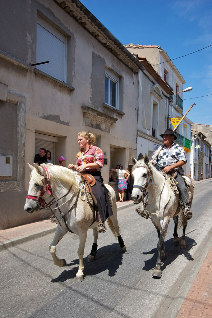 Gardians défilant au pas